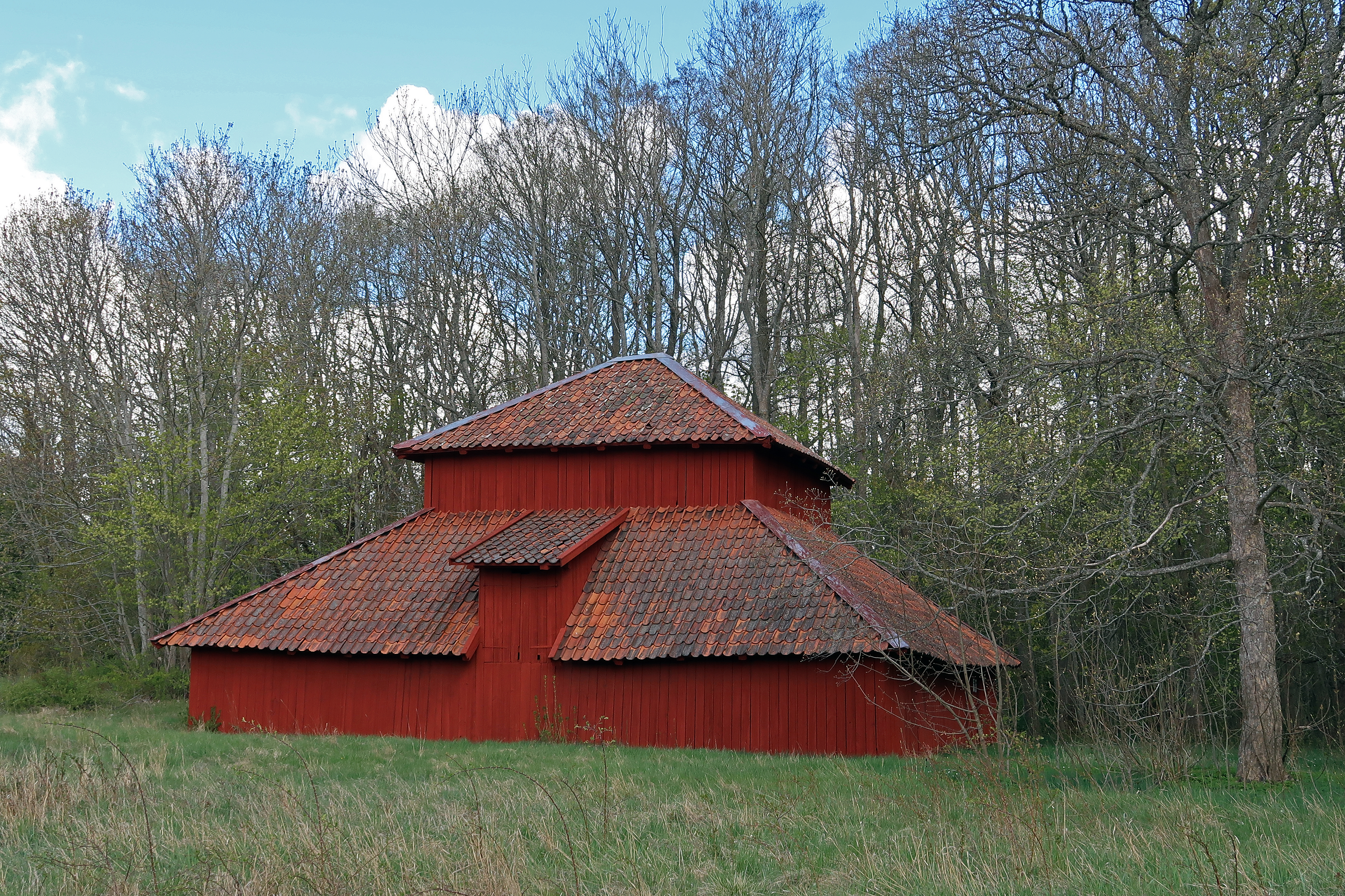 Tegelbruket vid Stjärnholm i Oxelösunds kommun är från 1730-talet och tillkom när den nya huvudbyggnaden byggdes.